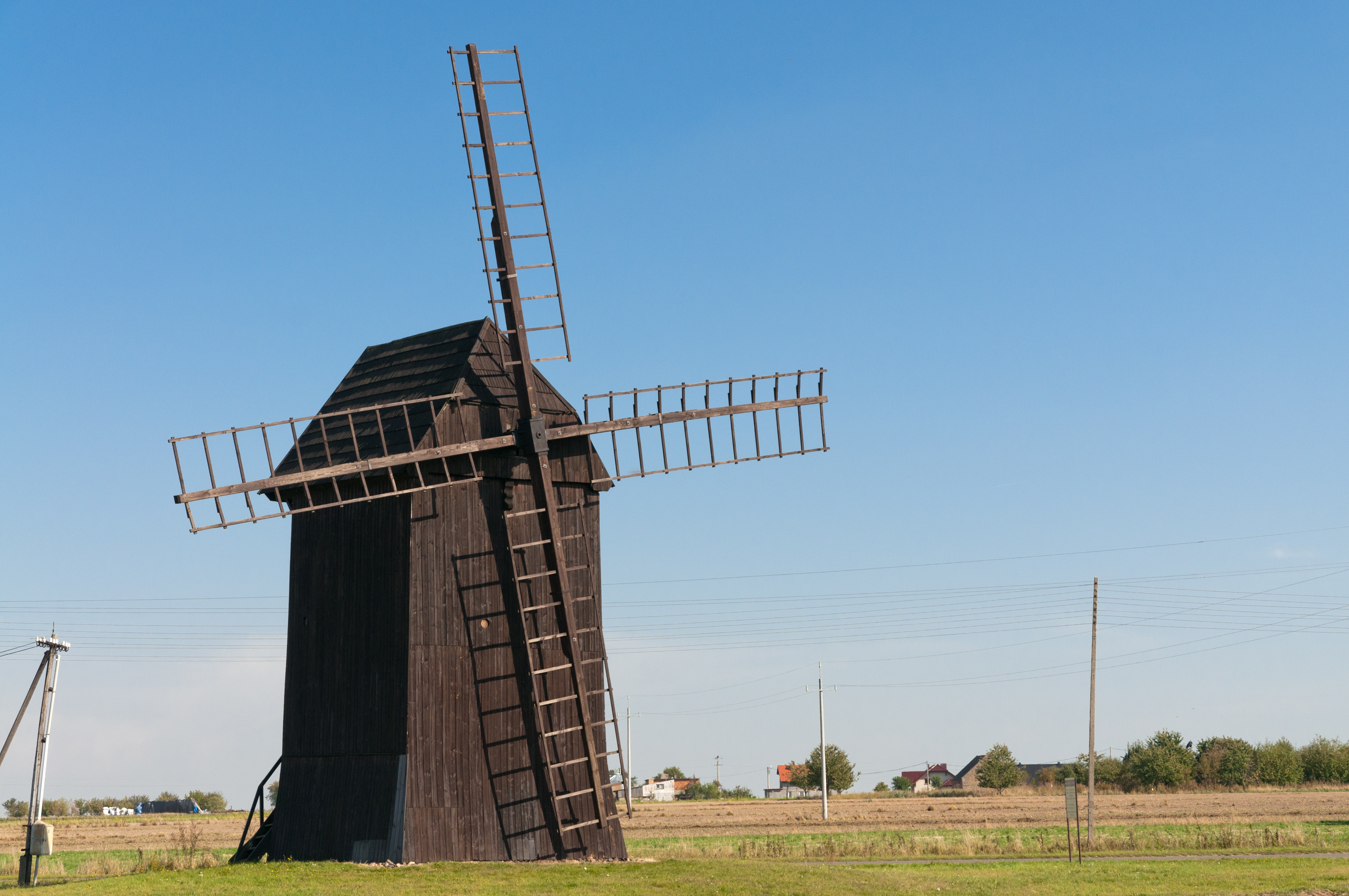 Sulmierzyce - wiatrak koźlak z 1797 r. (zabytek nr 442/A)